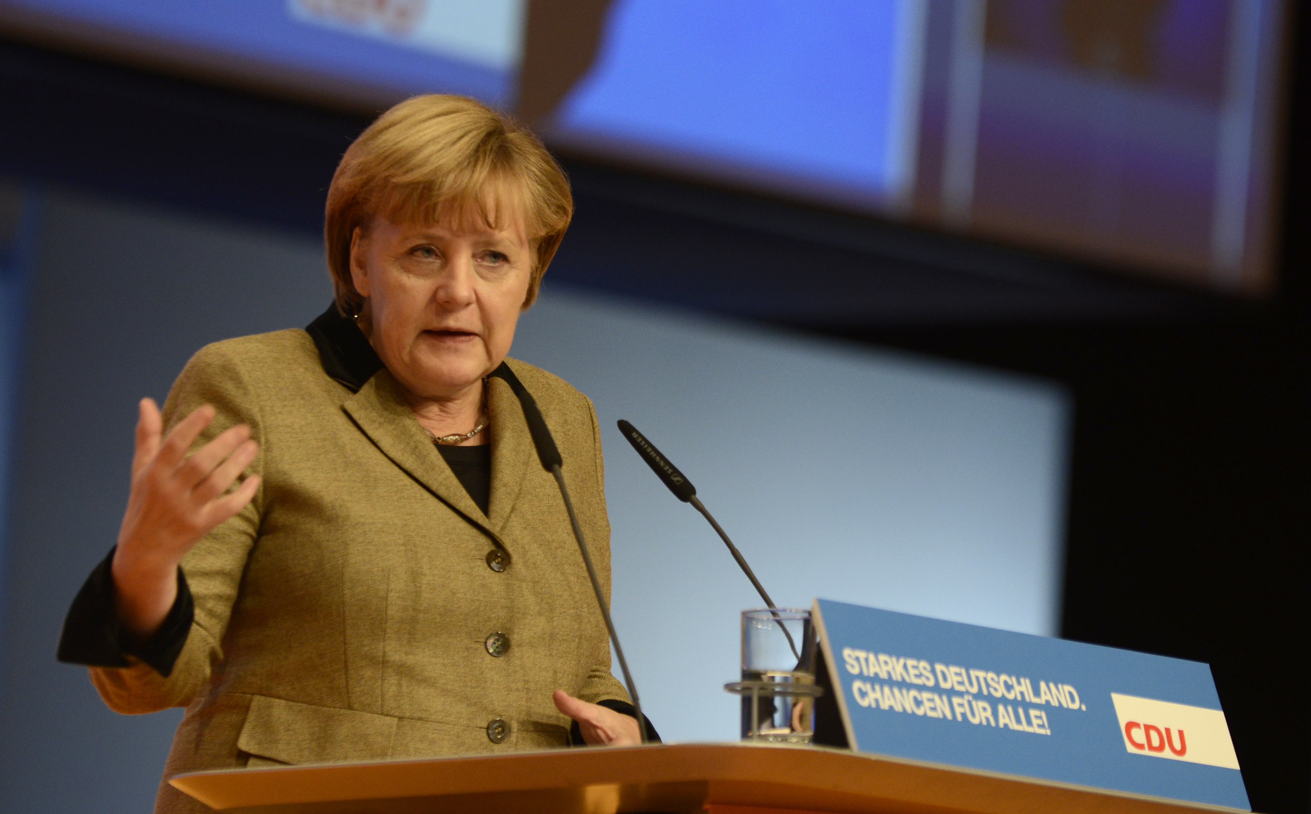 Rede der Bundeskanzlerin Angela Merkel zum Abschluss des CDU-Parteitages